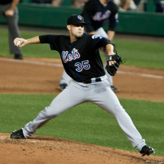 Dillon Gee